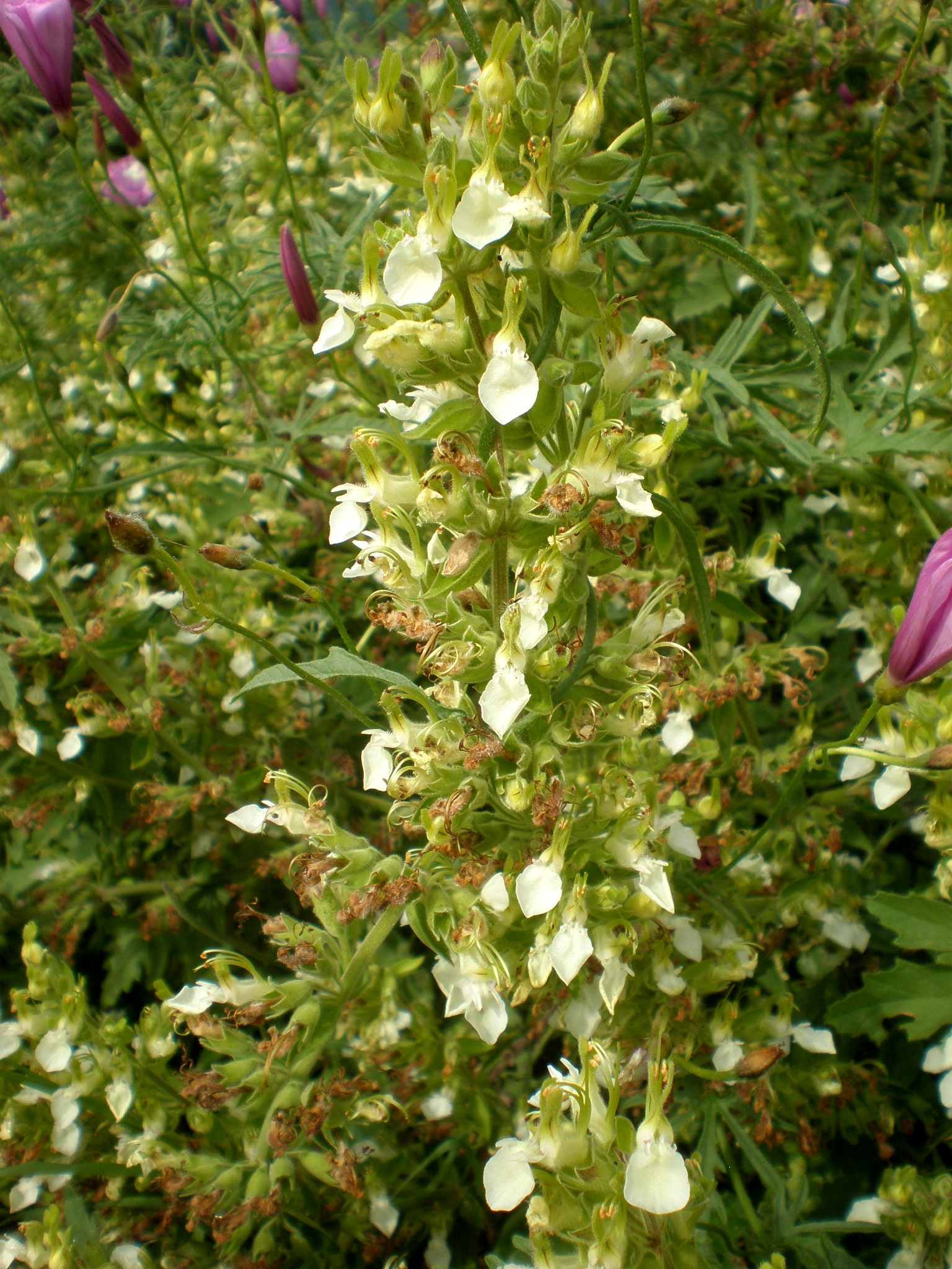 Jardín Botánico de Barcelona.